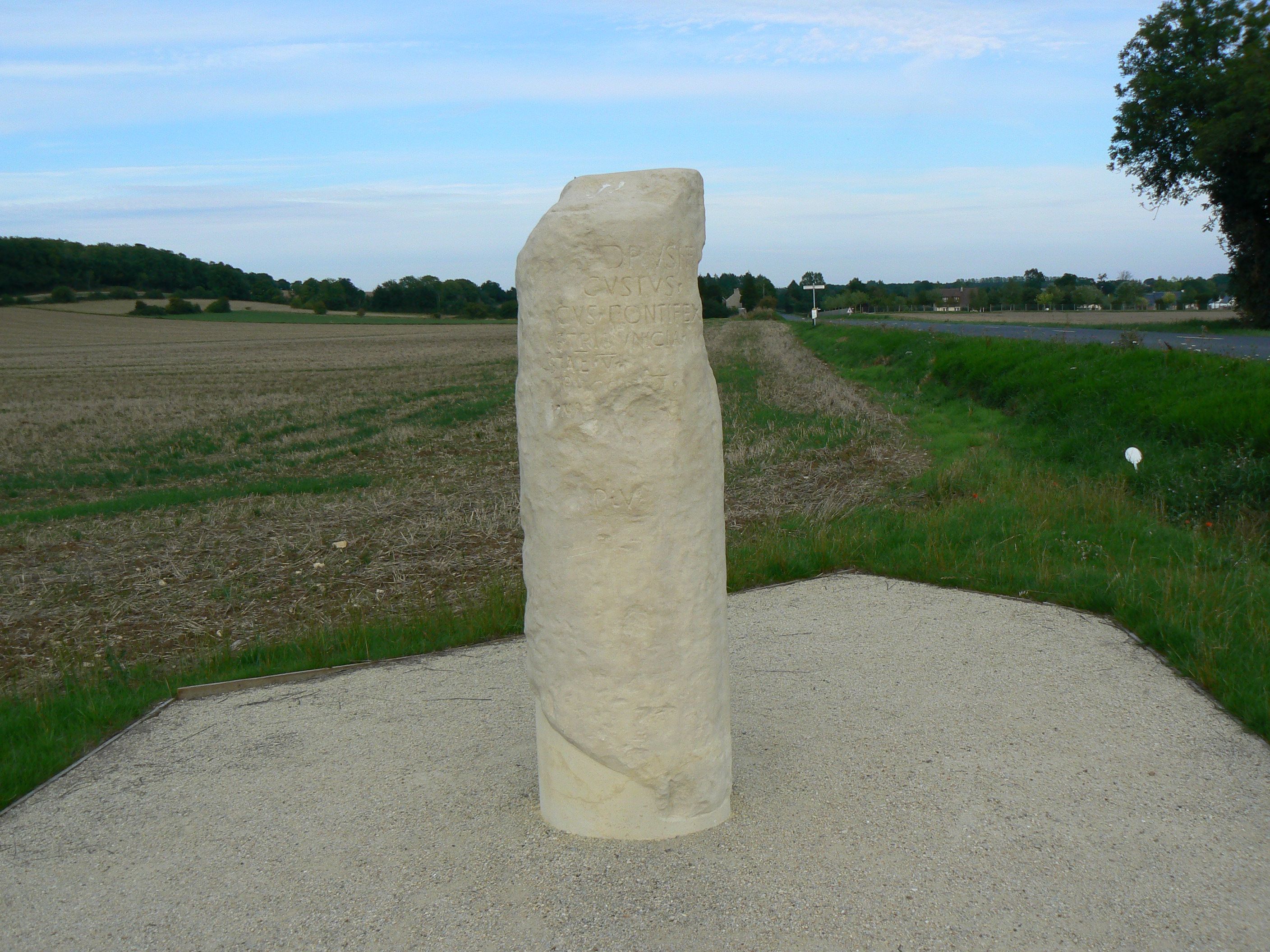 Réplique réalisée en 2010 de la borne milliaire du Manoir, époque de l'empereur Claude, Le Manoir (Calvados) : CIL XVII2, 00449 = CIL XIII, 08976 [Ti(berius) Cl]au[dius] Drusi f(ilius) / [Caesar Au]gustus [Ger]/[mani]cus pontifex [ma]/[ximus] tribunicia [pot]/estate V [imperator XI] / [p(ater) p(atriae) co(n)s(ul)] III / [des]ignat[us IIII] / m(ilia) p(assuum) V